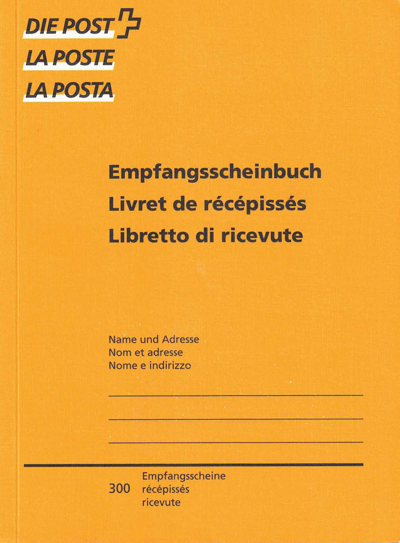 Livret de récépissés de la Poste suisse